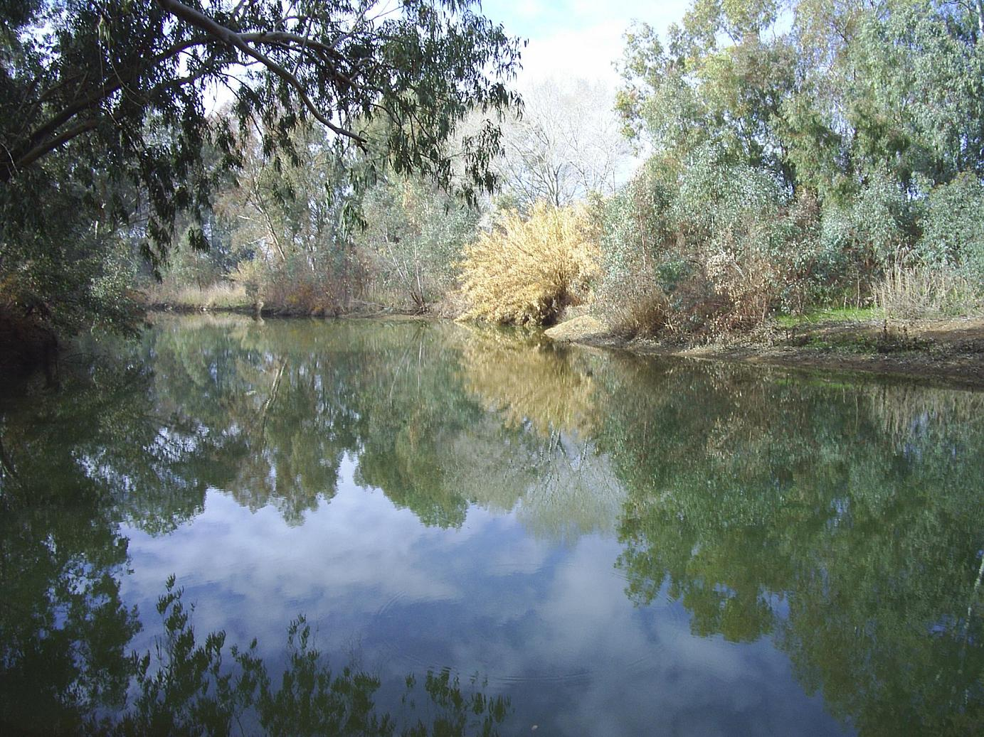 Tomada por Wwal el día 06-01-06. En Sanlúcar la Mayor (Sevilla, España)